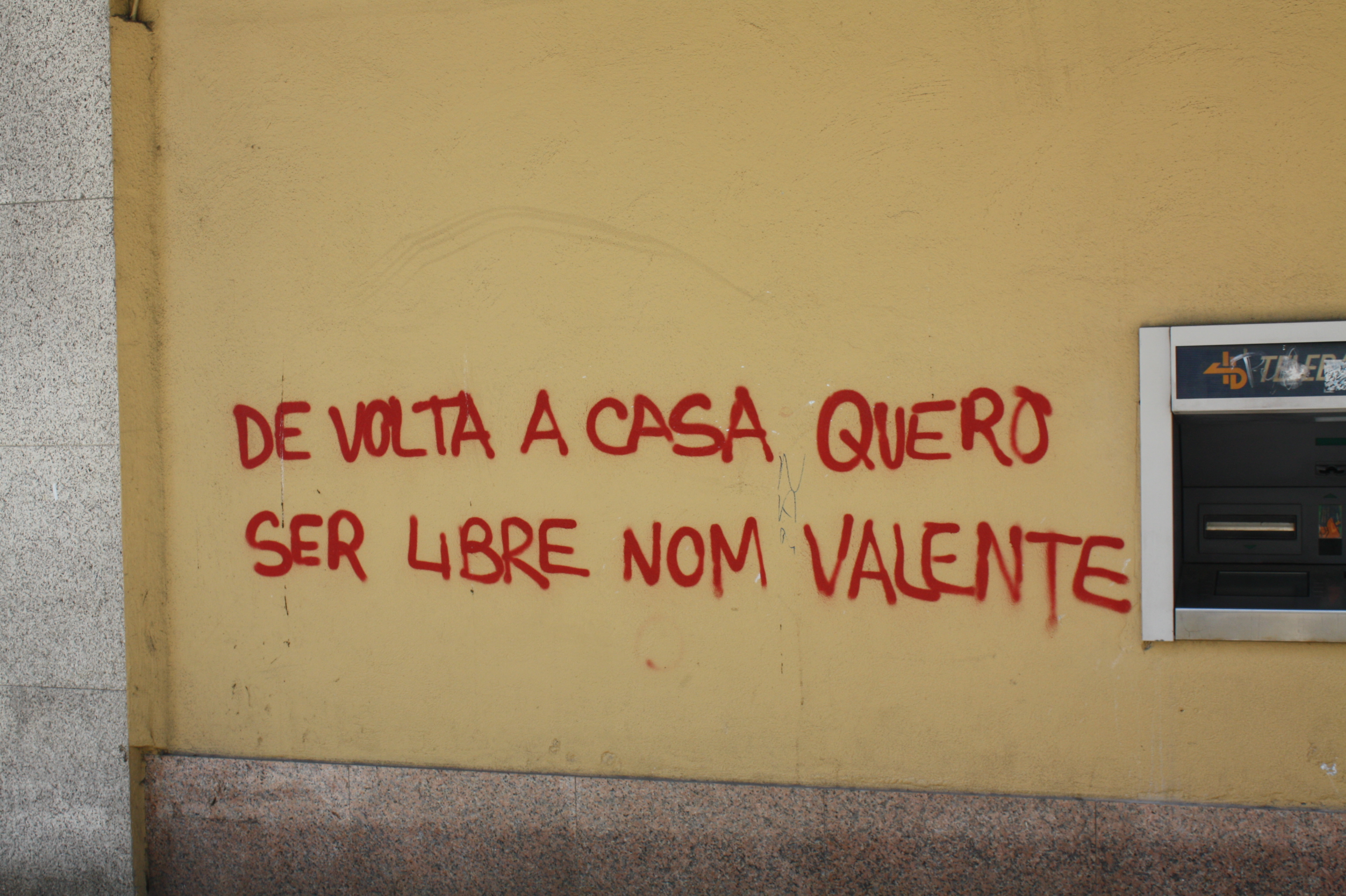 Pintada reivindicativa en Pontevedra (Avd. de Vigo, 8)